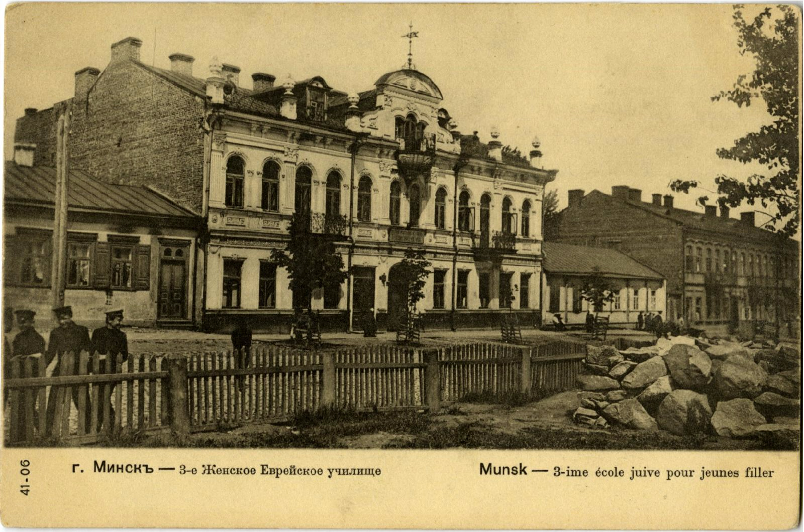 Беларуская (тарашкевіца): Менск (Miensk), Раманаўская Слабада (Ramanaŭskaja Słabada). Жаночая жыдоўская вучэльня